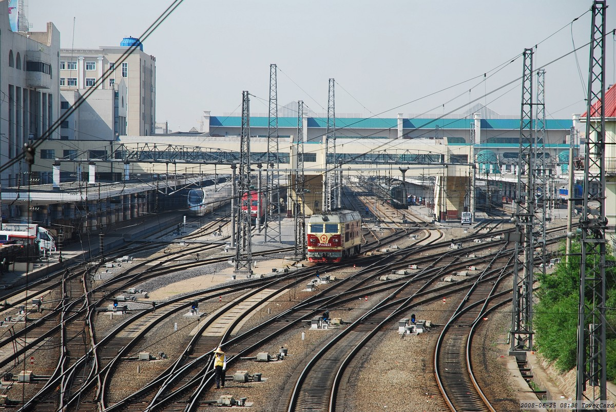 霁虹桥上看哈站